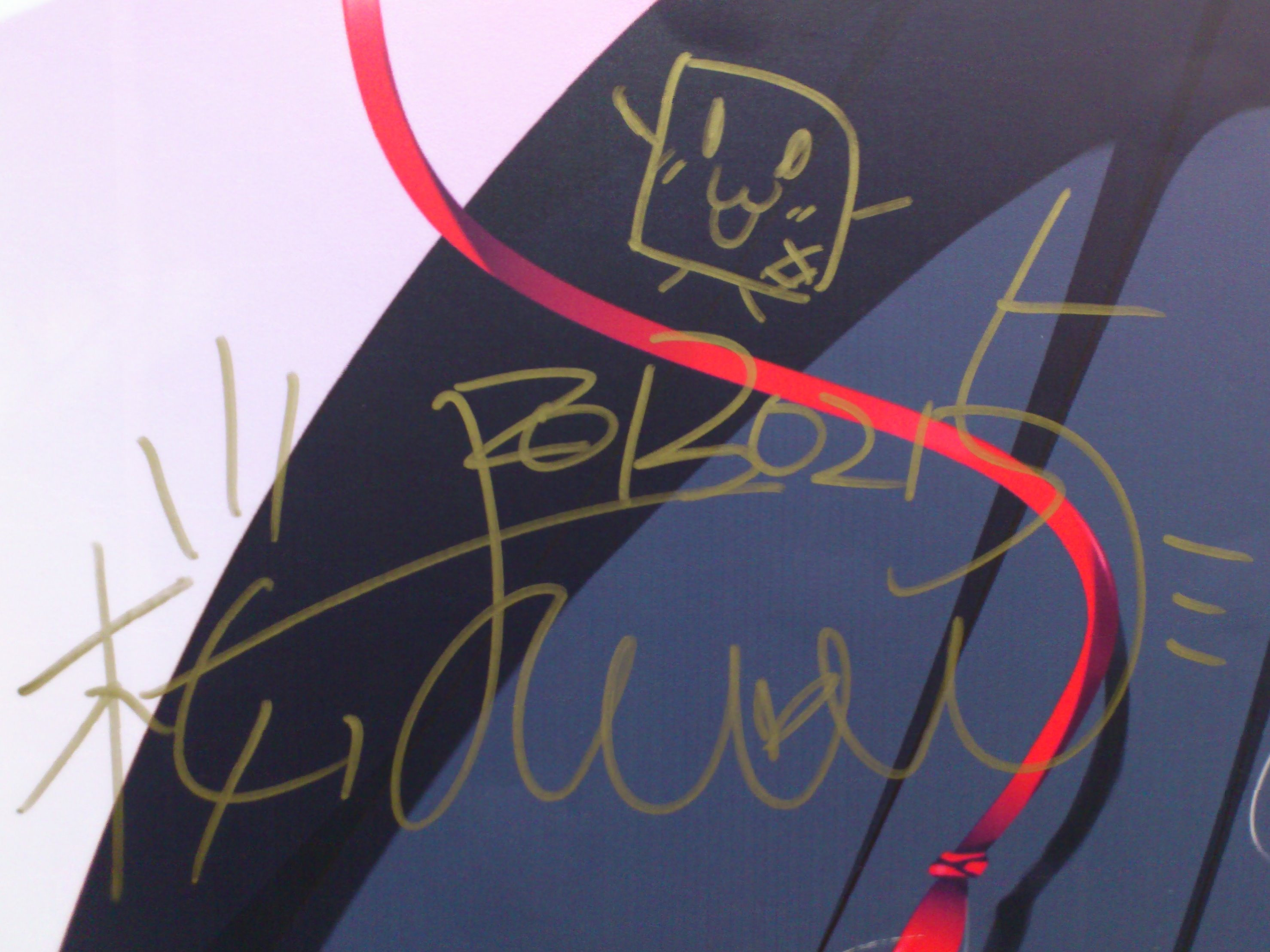 中文（台灣）: 2013年2月15日，安利美特台北旗艦店內的櫻半片（桜はんぺん）簽名。店方已於2013年下半年撤除此簽名。